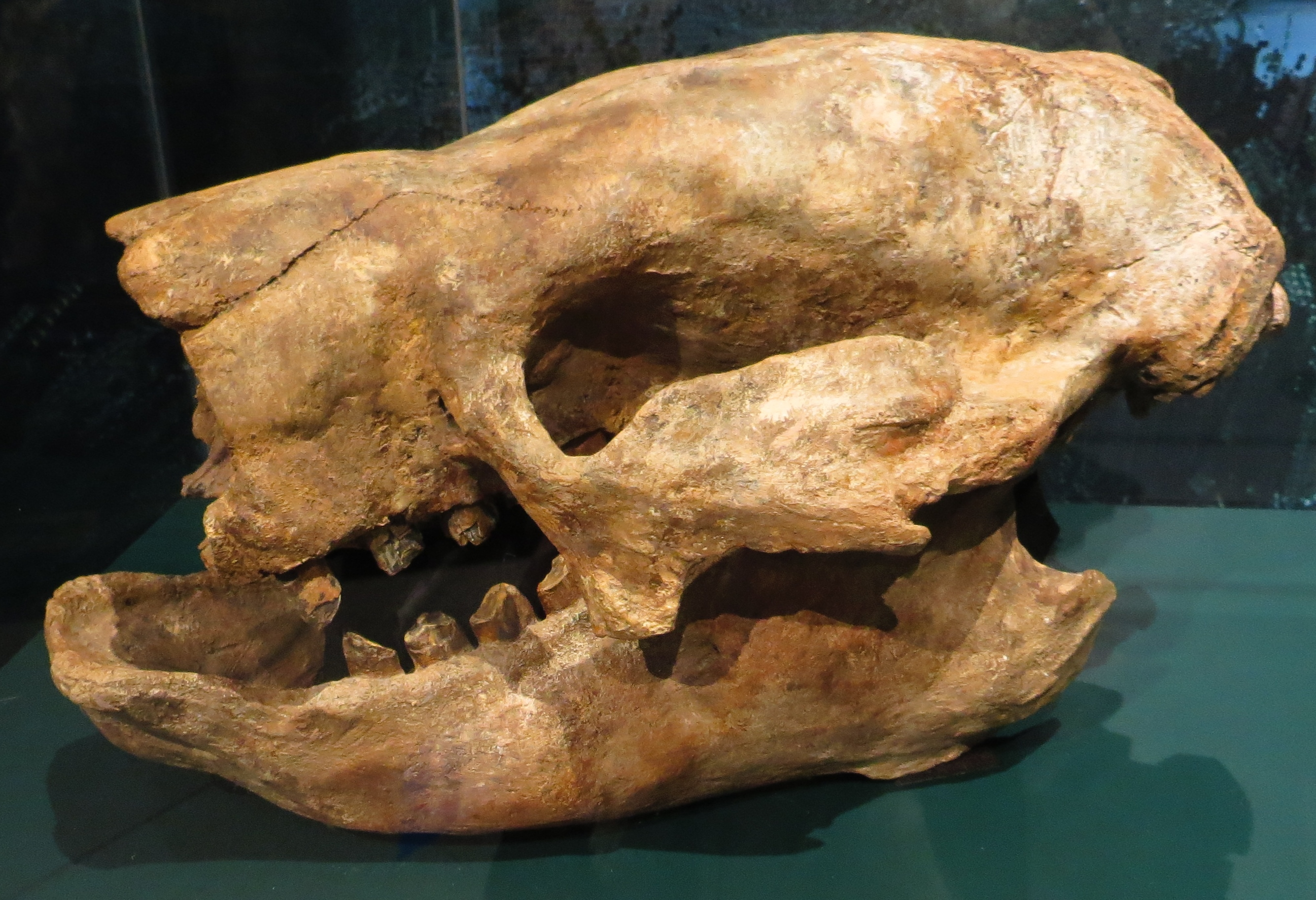 Fossil - Took the picture at Natural History Museum, Karlsruhe